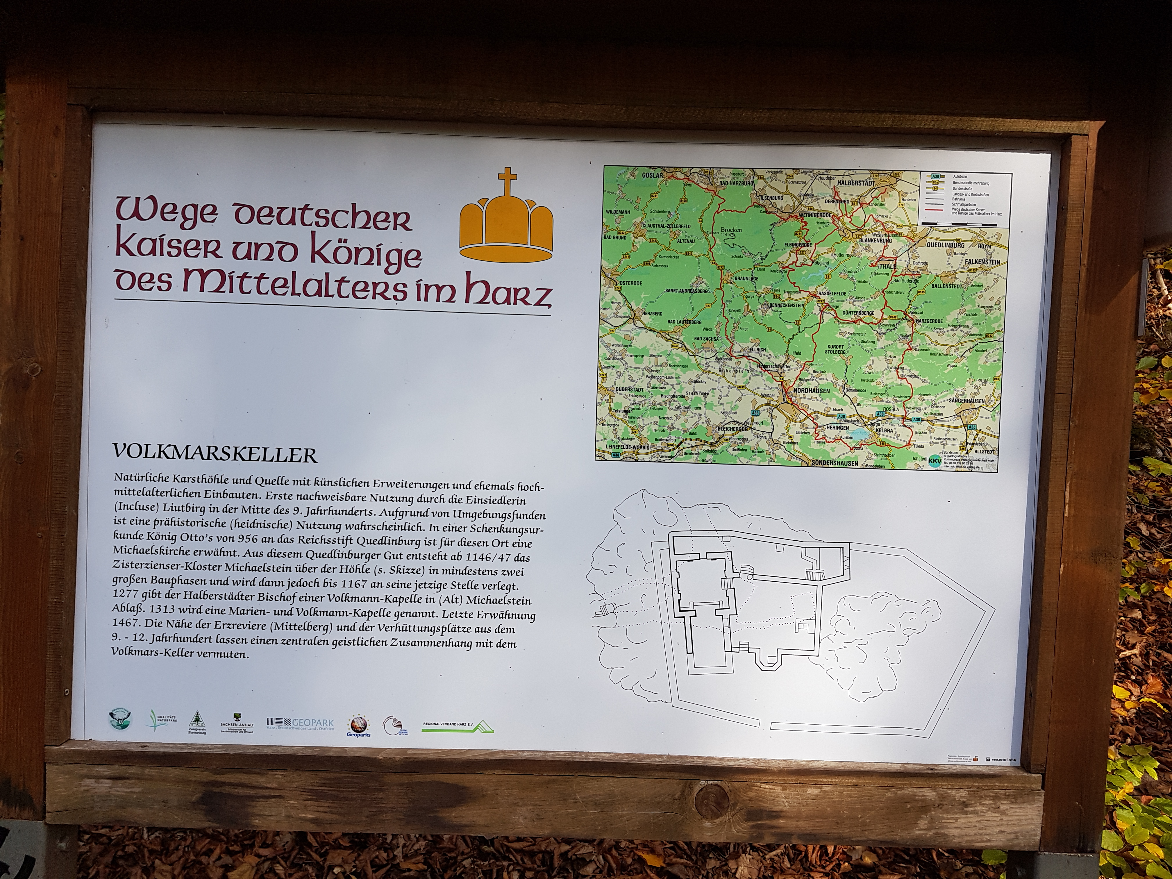 Infotafel Volkmarskeller